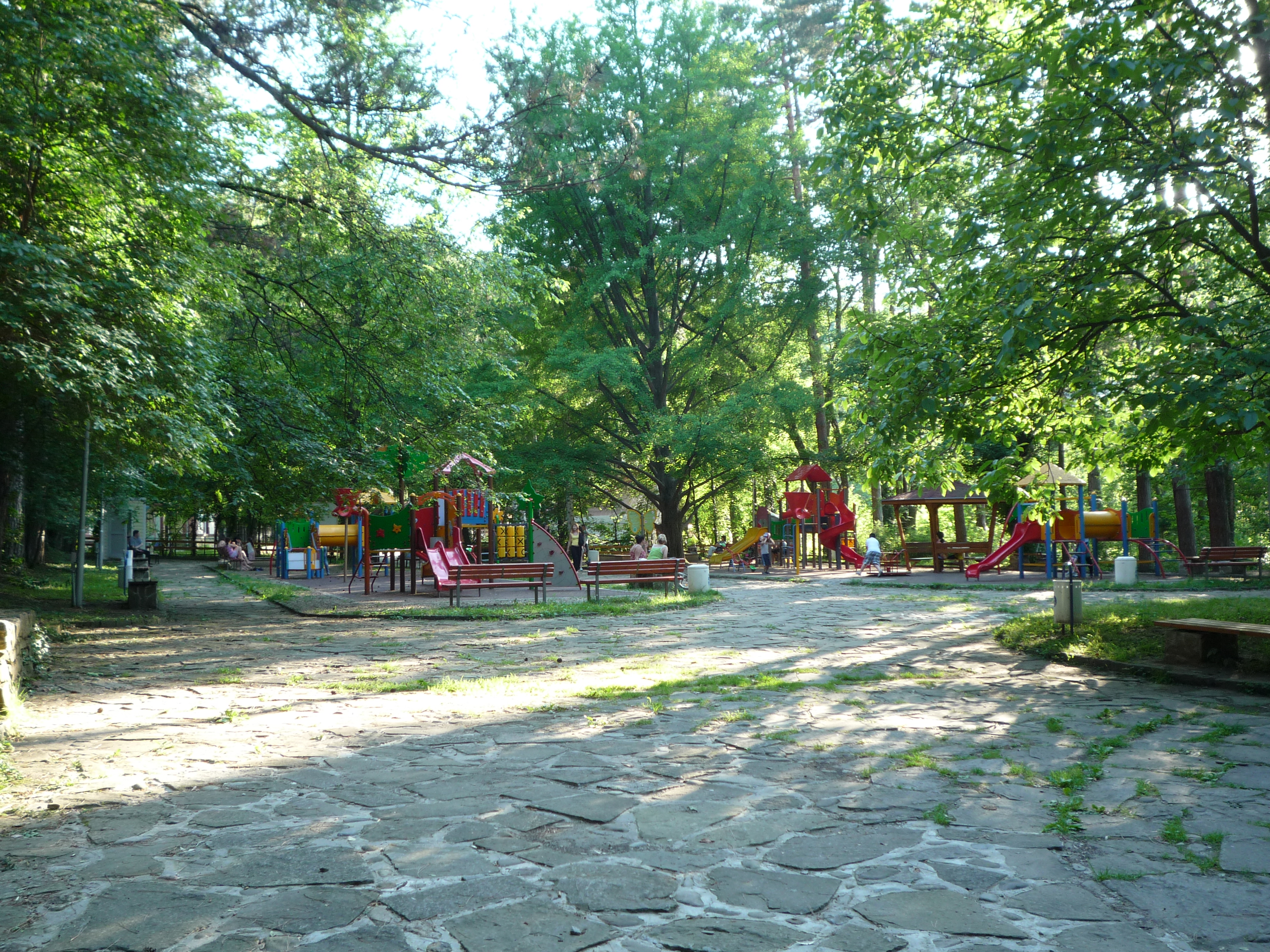 Баш Бунар-детски кът